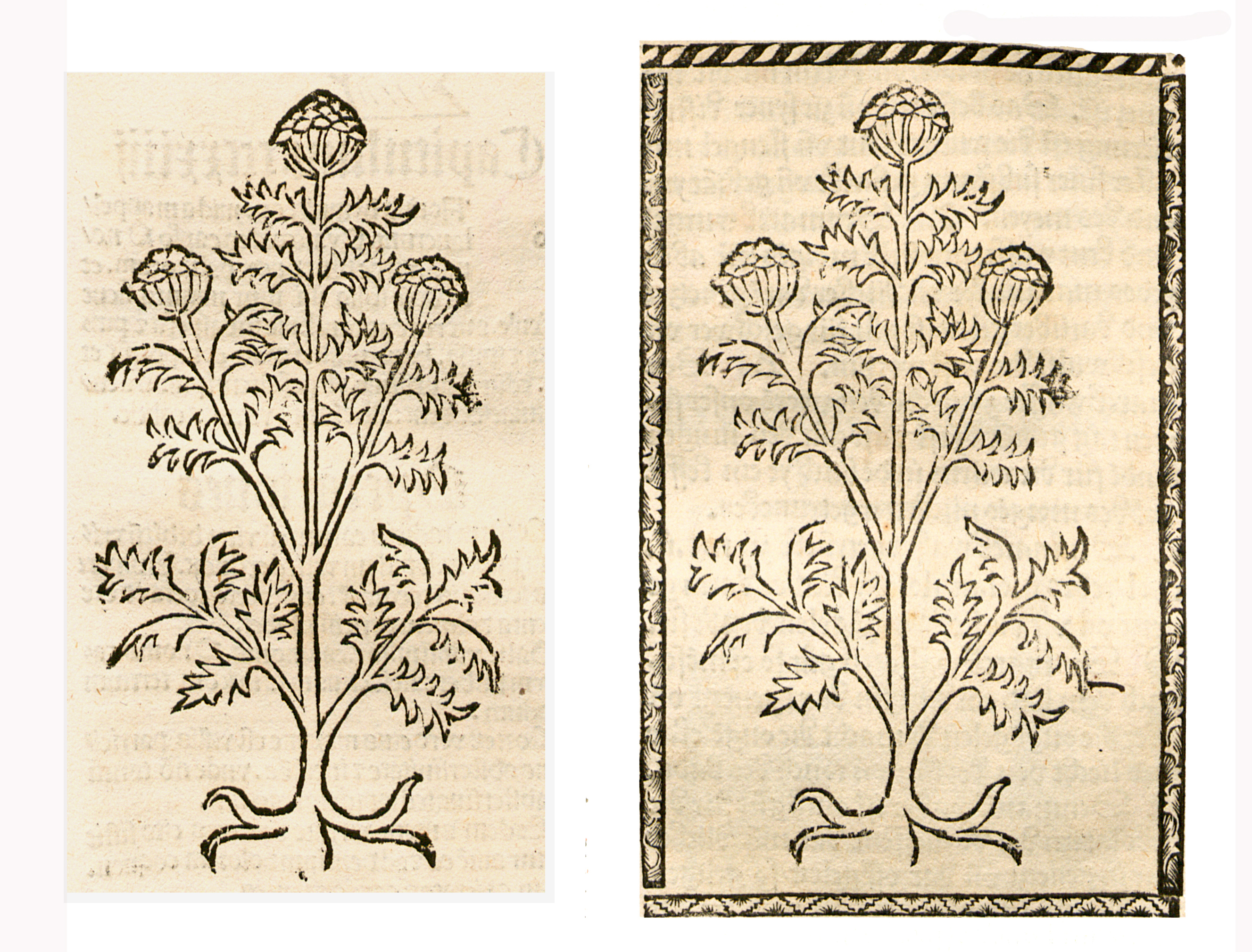 Abbildung von: Baldrian